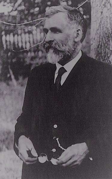 Der Kunsthistoriker in seinem Garten